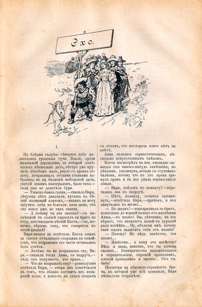 Рассказ Юлии Безродной в журнале "Артист", № 41, сентябрь 1894 г.